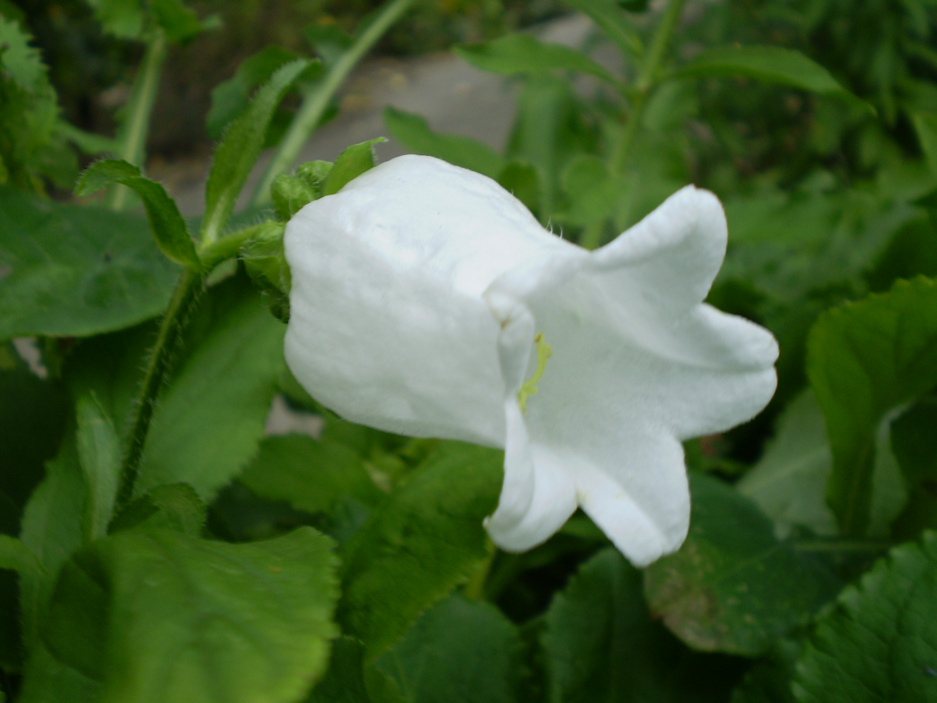 Campanula medium mariete klokje